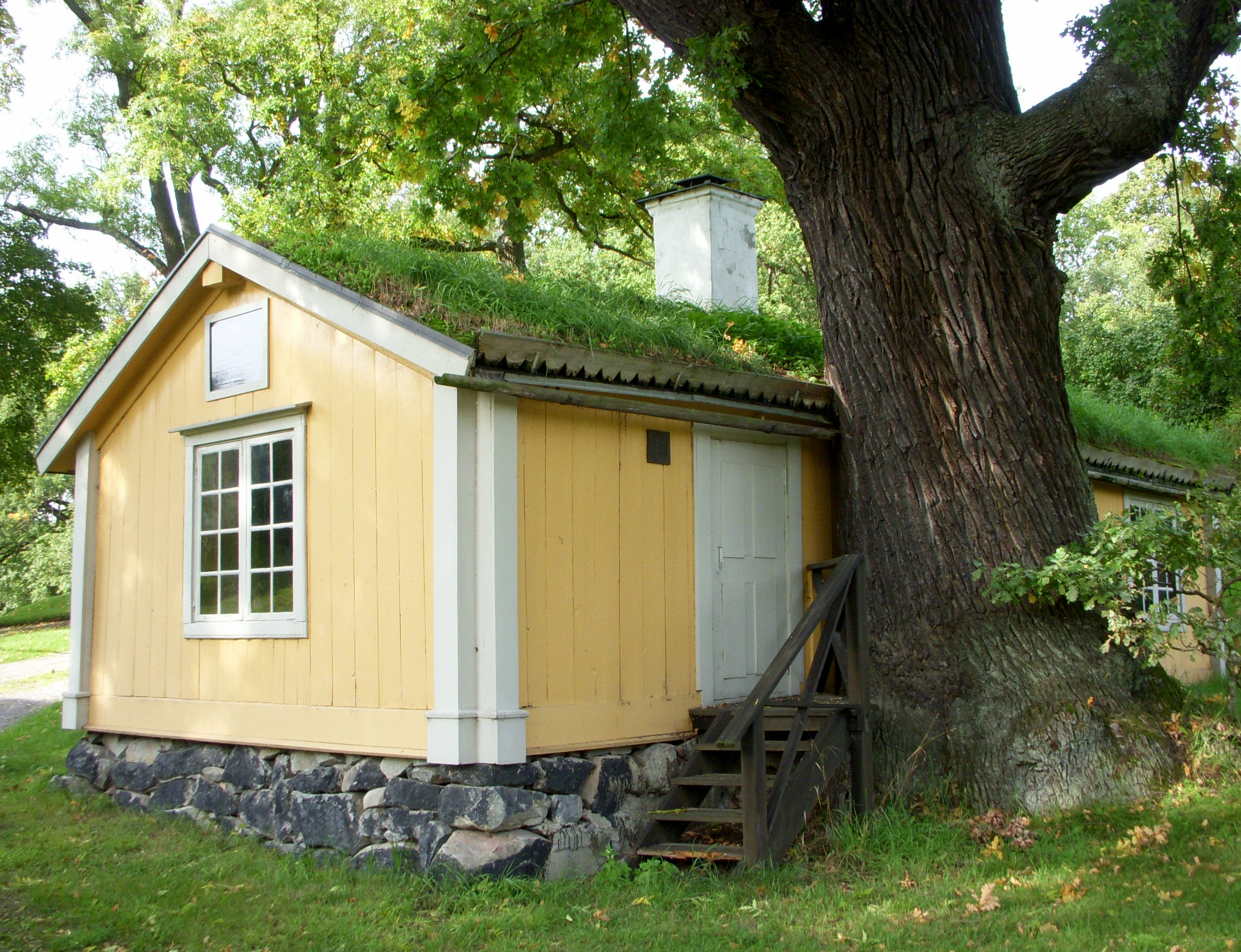 Karl XI:s fiskarstuga är en historisk byggnad på Norra Djurgården